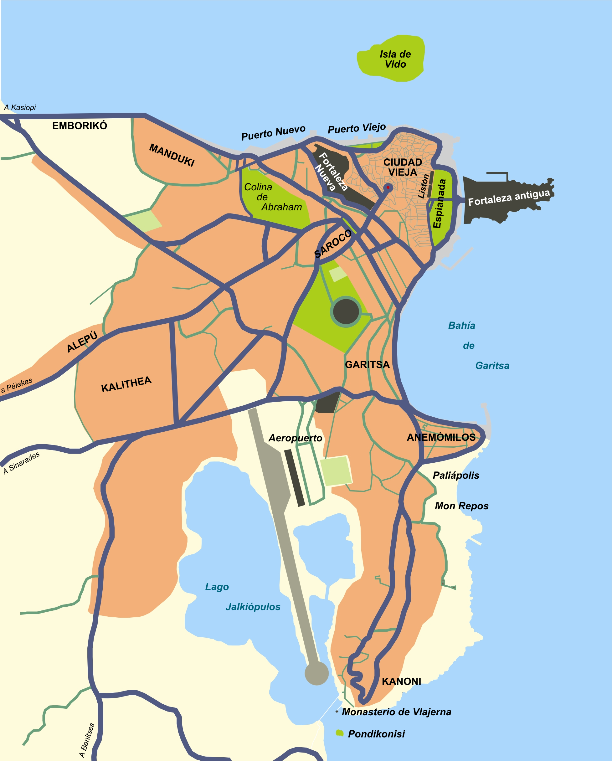 Χάρτης της πόλης Κέρκυρας